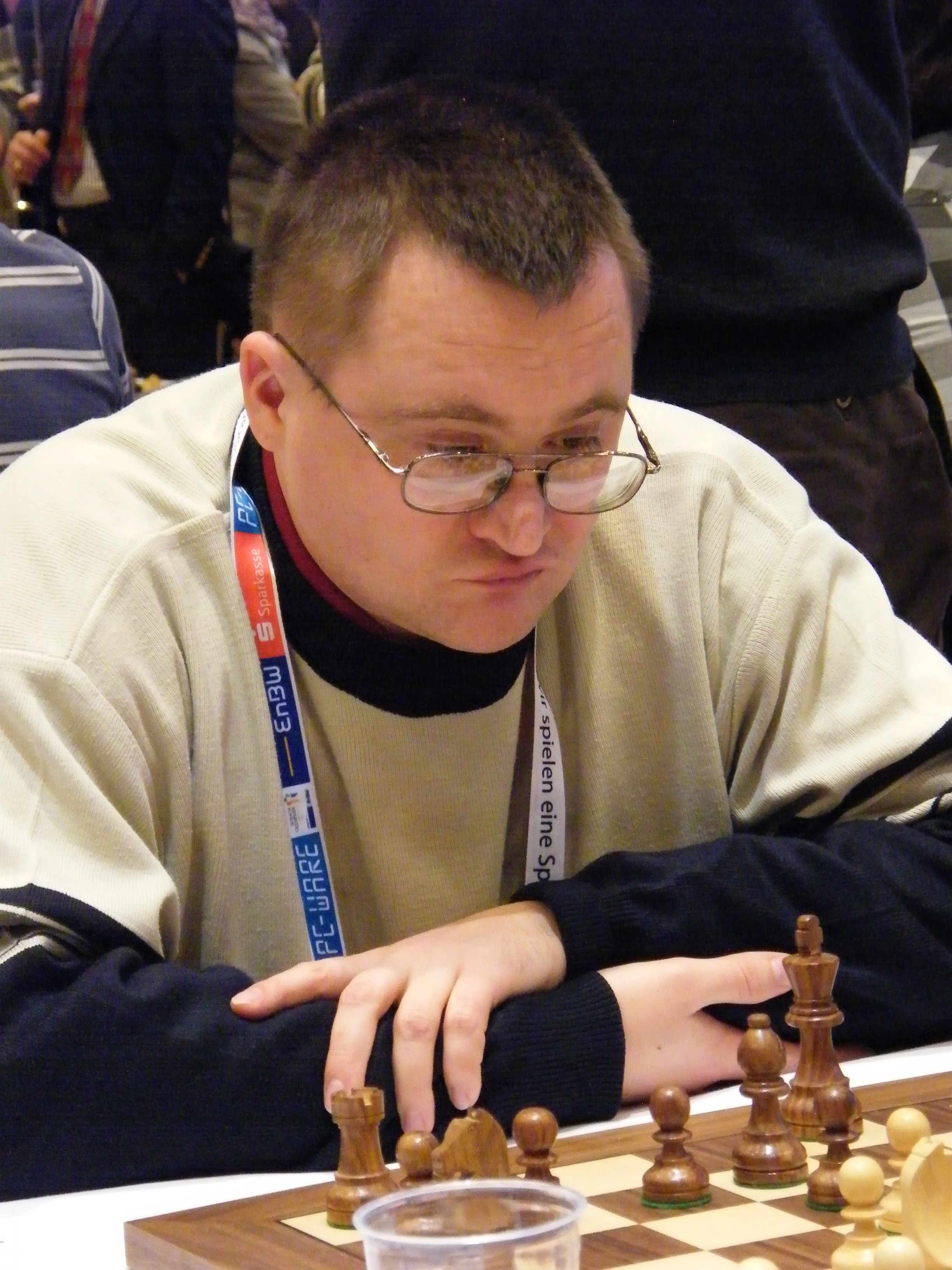 Alexej Fedorow bei der 38. Schacholympiade in Dresden 2008